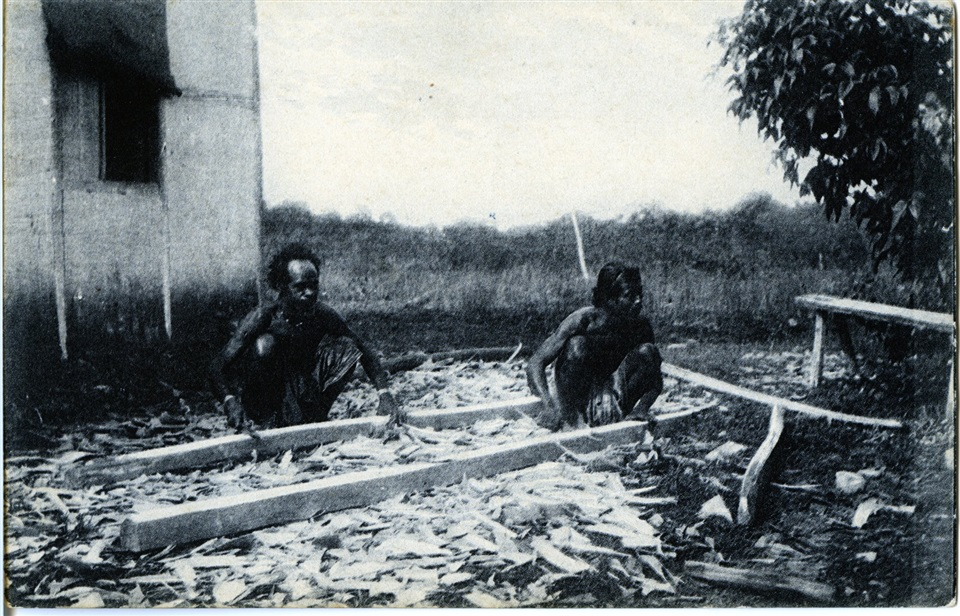 Postal de Timor Leste